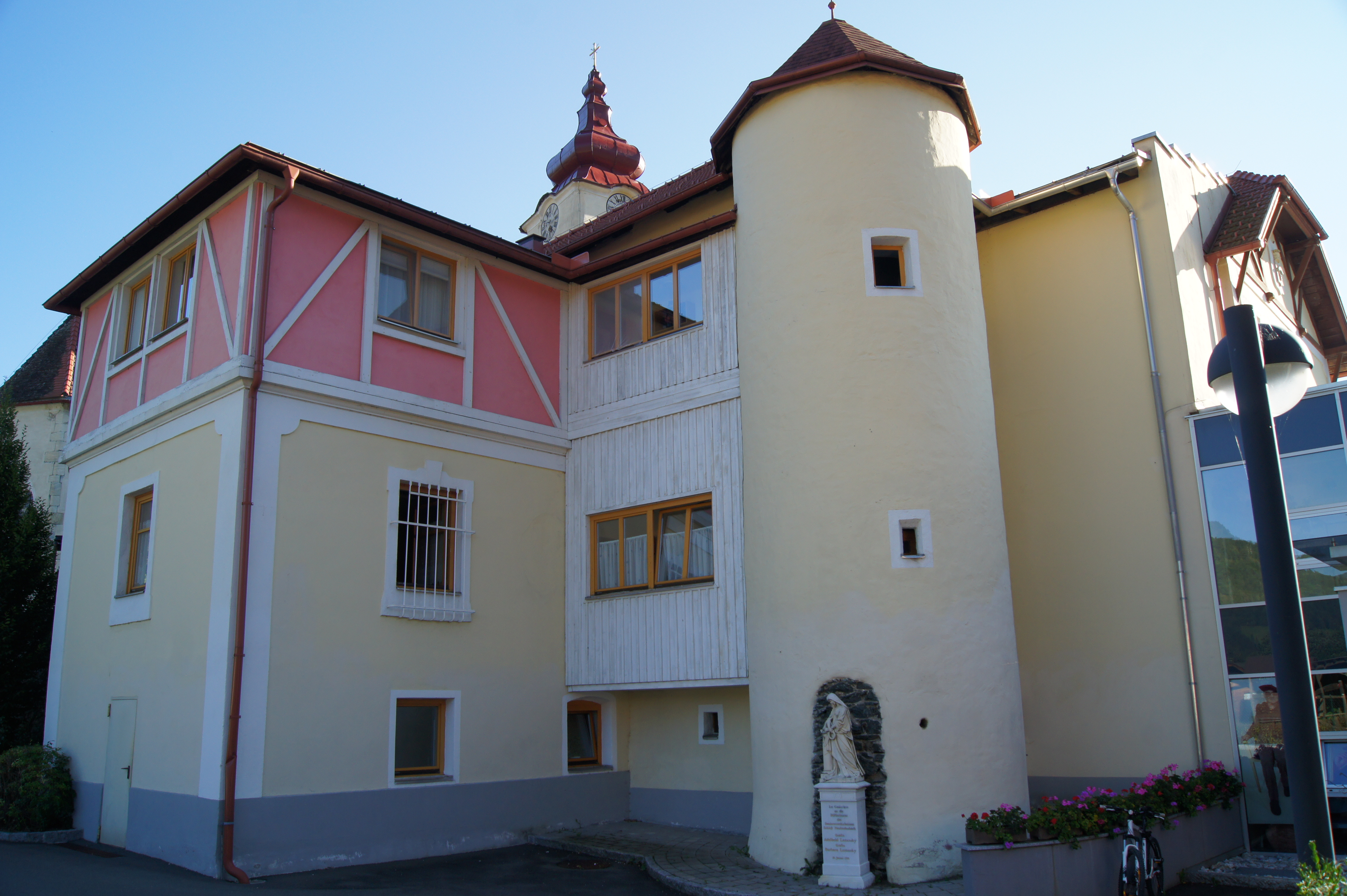 Teil des Altersheimes in Teufenbach, ehem. Schloss Neu-Teuffenbach